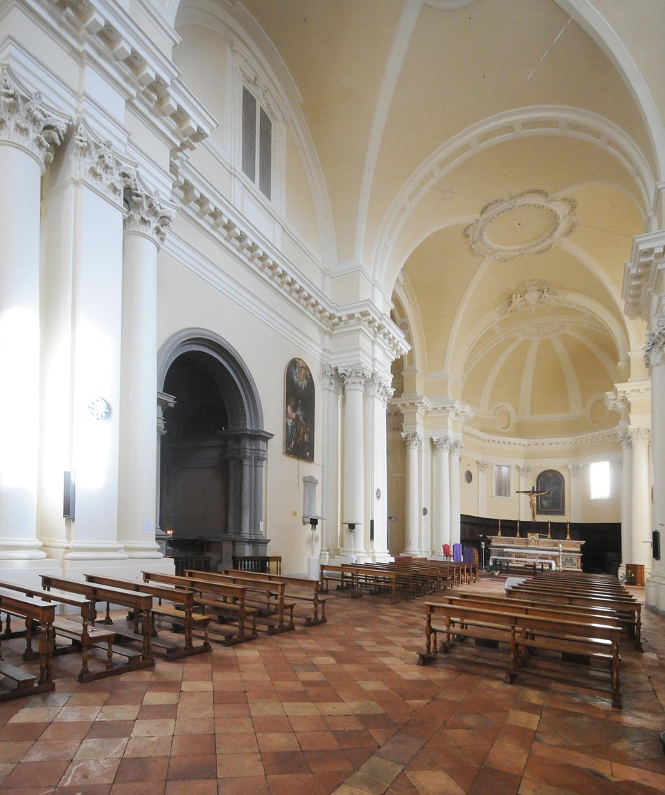 Chiesa di Sant'Agostino